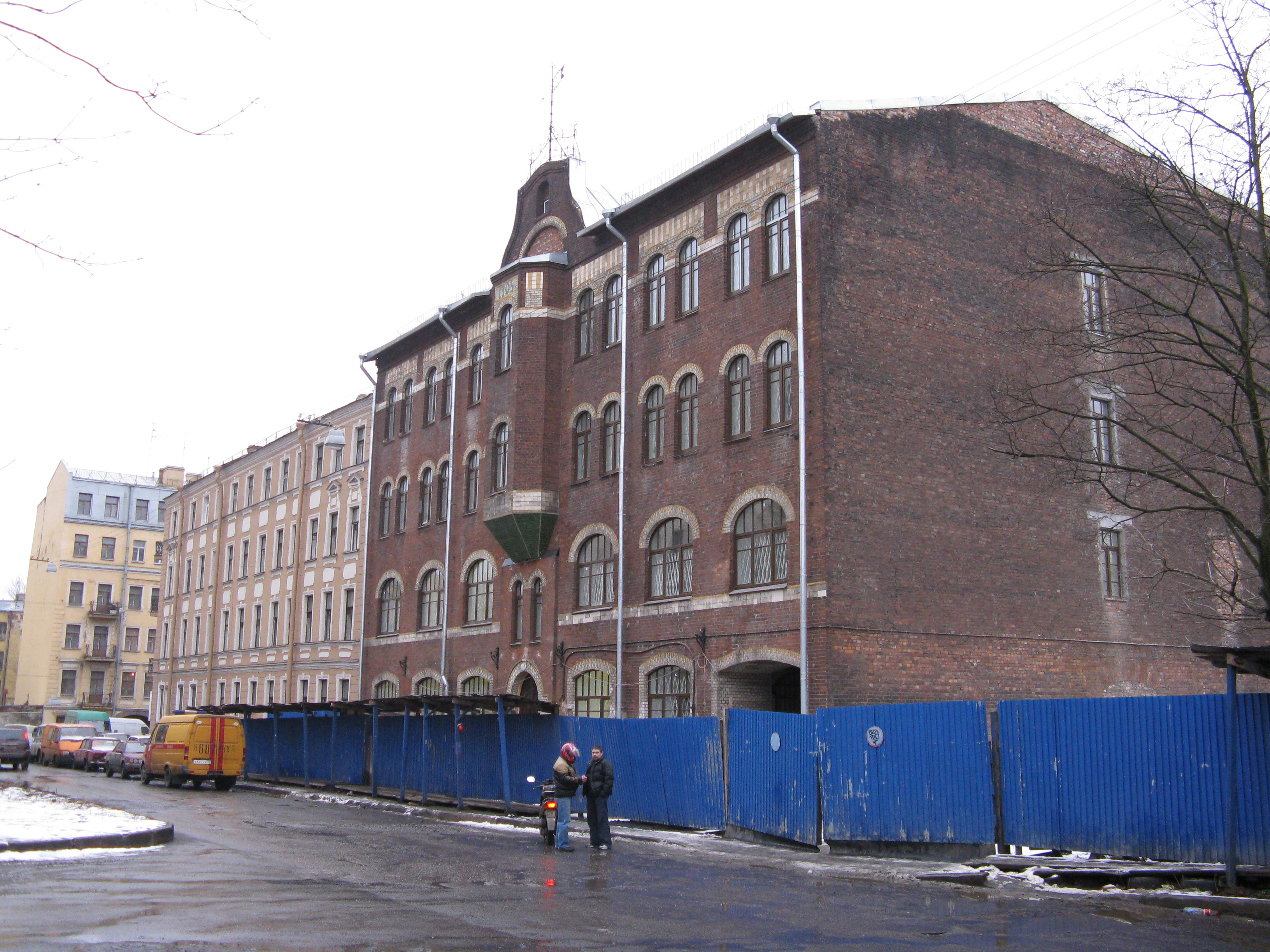 Bobruiskaia 4 and Bobruiskaia 2 (St.-Petersburg, Russia)